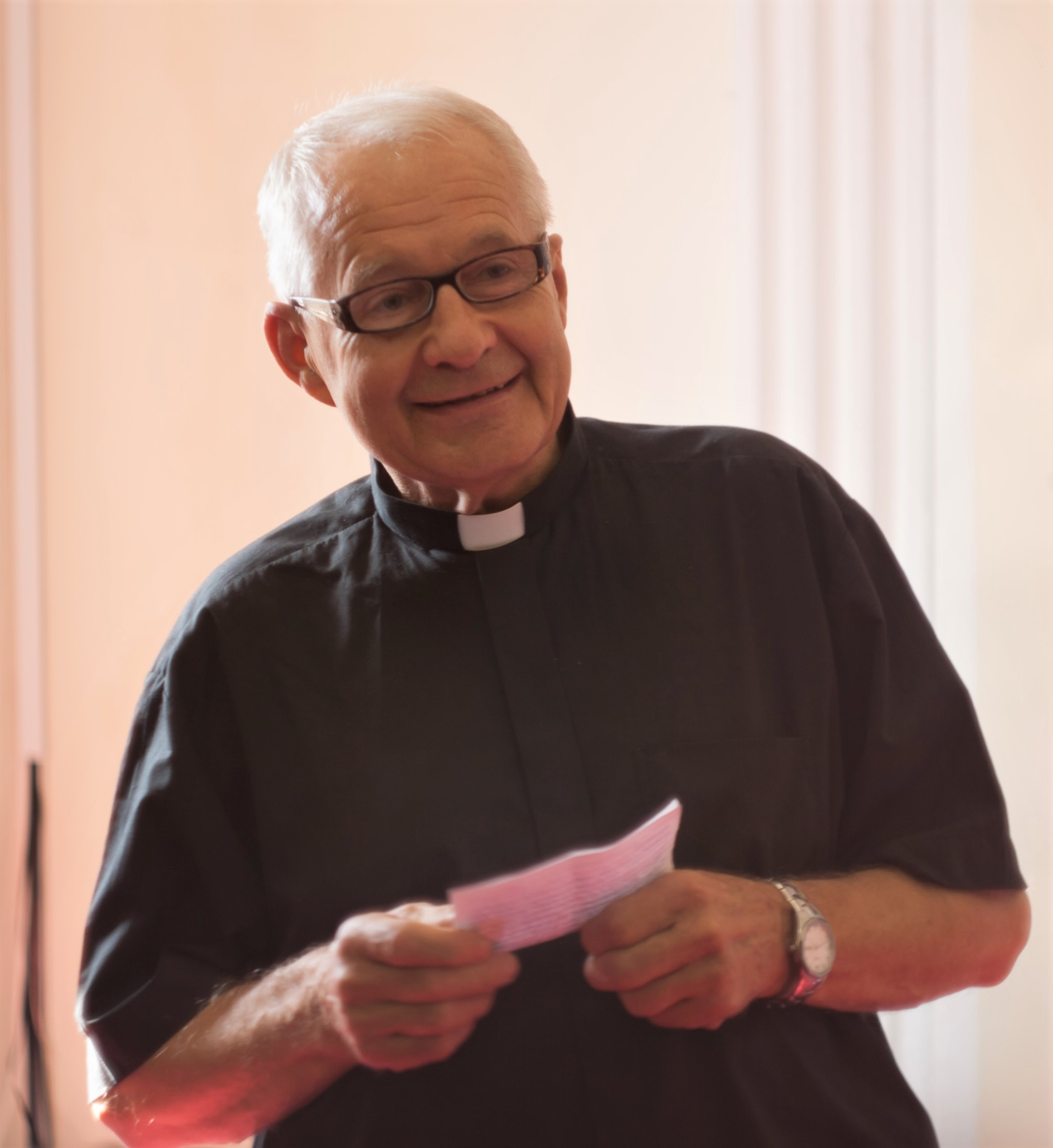 František Beneš 2016